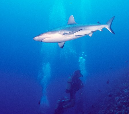 Requin gris de récif (Carcharhinus amblyrhynchos). Requin gris photographié à Rangiroa, archipel des Tuamotu, Polynésie française, en novembre 2002, par environ 20 mètres de fond, sur le site de la passe de de Tiputa.